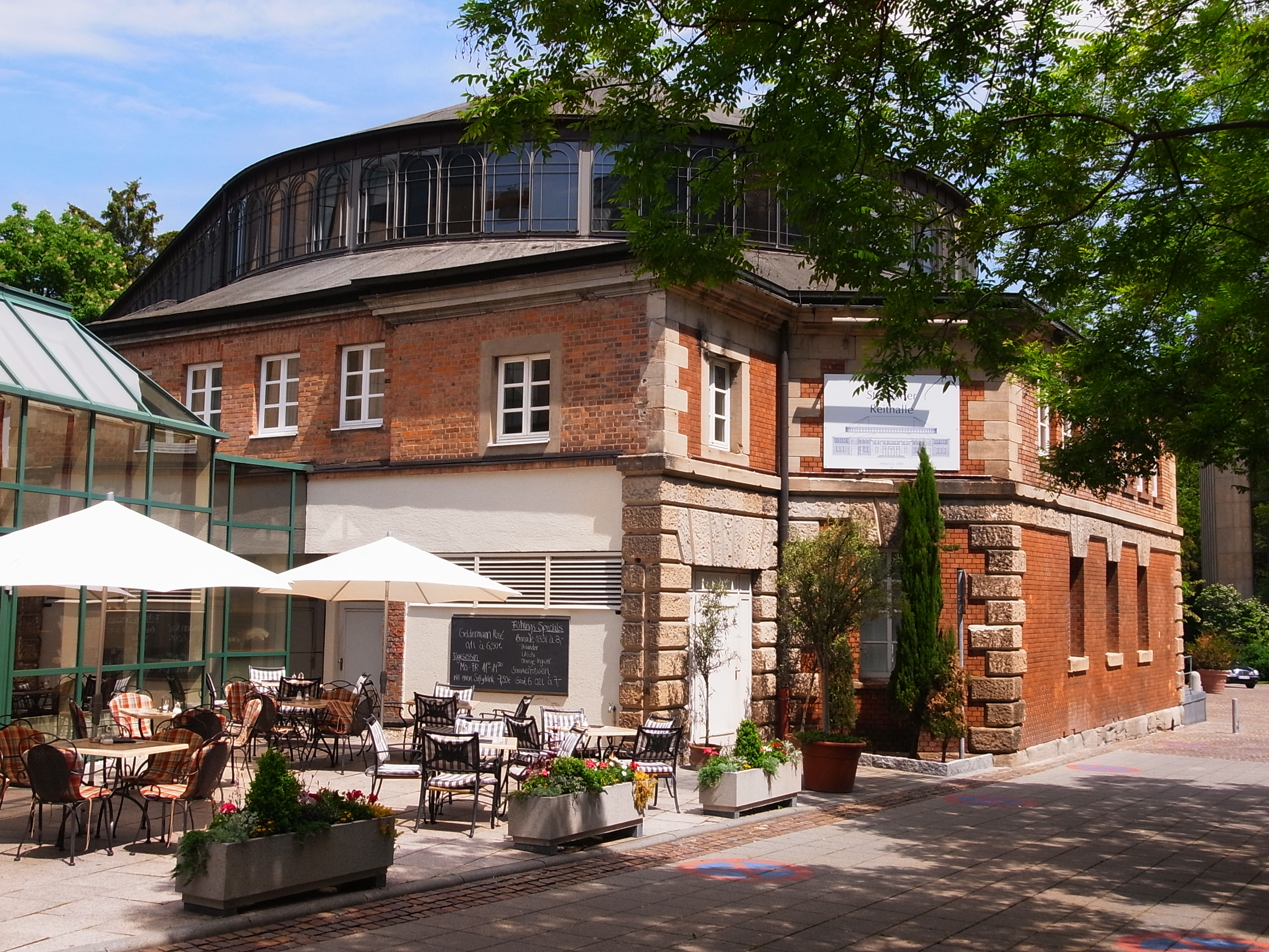 Die Alte Reithalle von Südwest nach Nordost erfasst